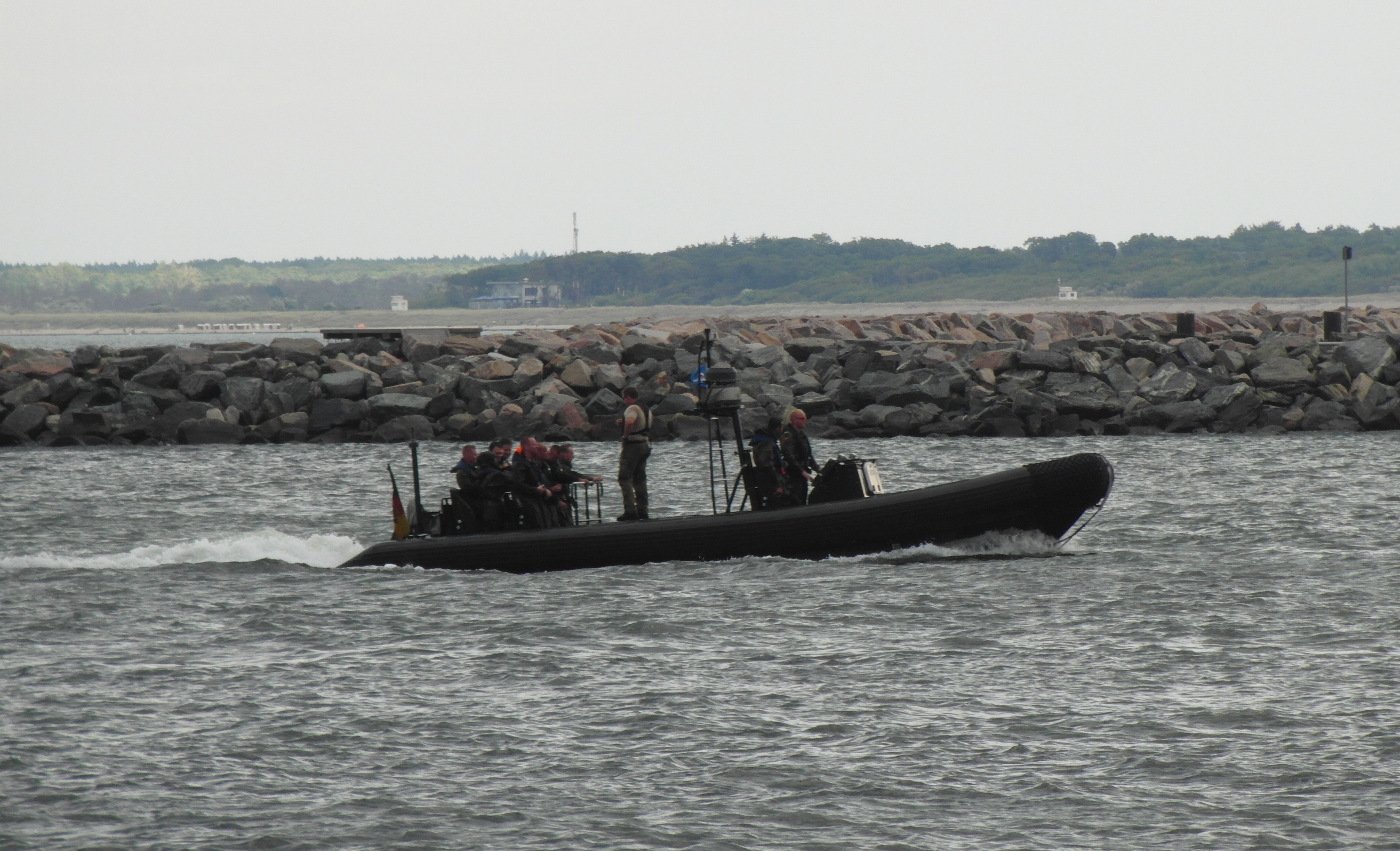 Kampfschwimmer der Bundeswehr bei der Einfahrt in Warnemünde